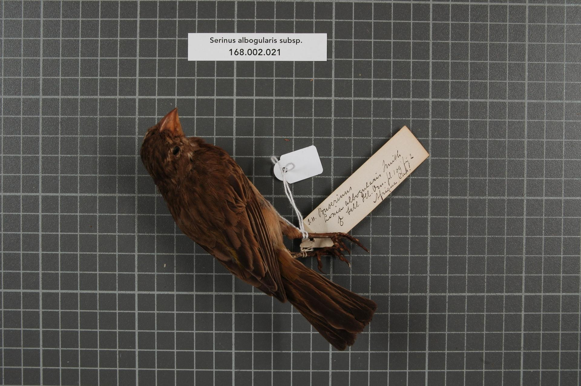 Serinus albogularis subsp.